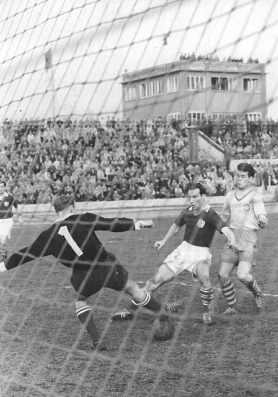 Zentralbild-Kollektiv Bey.-Ni. 6.5.1956 Berliner Ortsderby endete 1:1 - Bereits am Sonnabend, d. 5.5.1956, standen sich im Berliner Friedrich-Ludwig-Jahn-Sportpark im Fußballmeisterschaftsspiel die Mannschaften von Vorwärts Berlin und Dynamo Berlin gegenüber. Das Ortsderby endete 1:1-Unentschieden. Der Gastgeber Vorwärts hatte Pech, dass in der Drangperiode während der 1. Halbzeit der beste Stürmer Wirth, verletzt ausscheiden musste. UBz.: Eine gefährliche Situation vor dem Dynamo-Tor. Torwart Klemm (links) klärt durch eine Fußabwehr. Er wird dabei von seinem Mittelverteidiger Schoen (Mitte) unterstützt. (Rechts): Vorwärts-Mittelstürmer Kalinke.